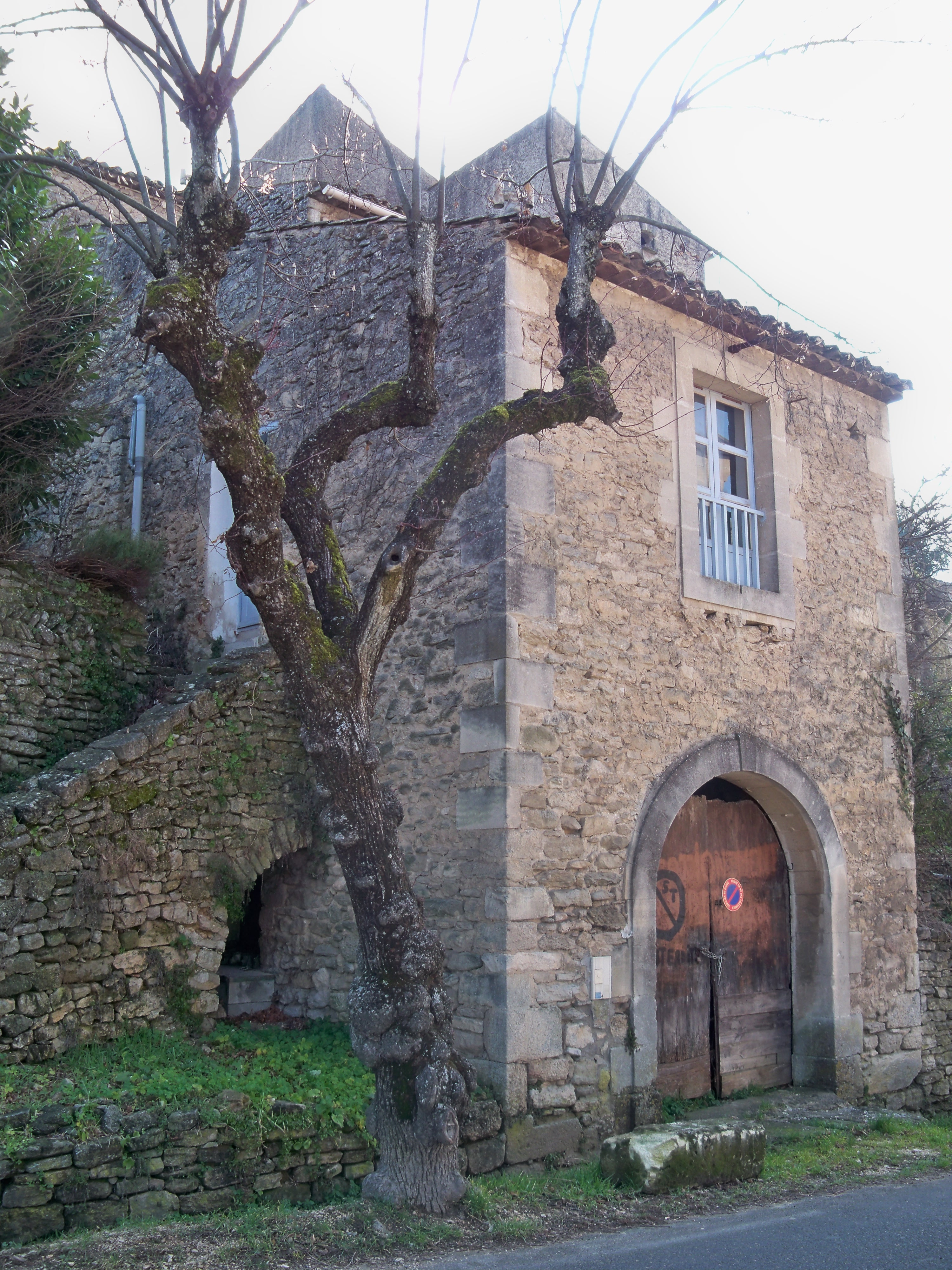 Maison en hauteur à Bonneux, Vaucluse, France